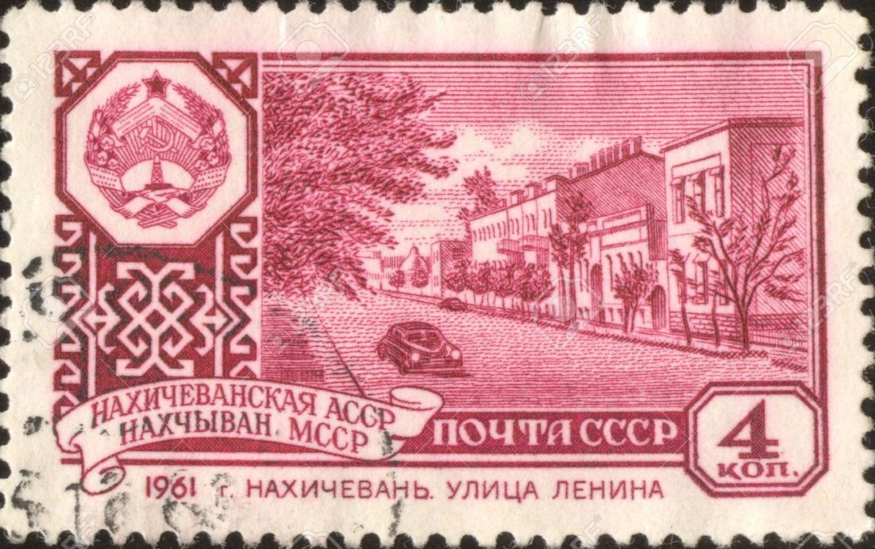 Naxçıvan mövzulu SSRİ poçt markası